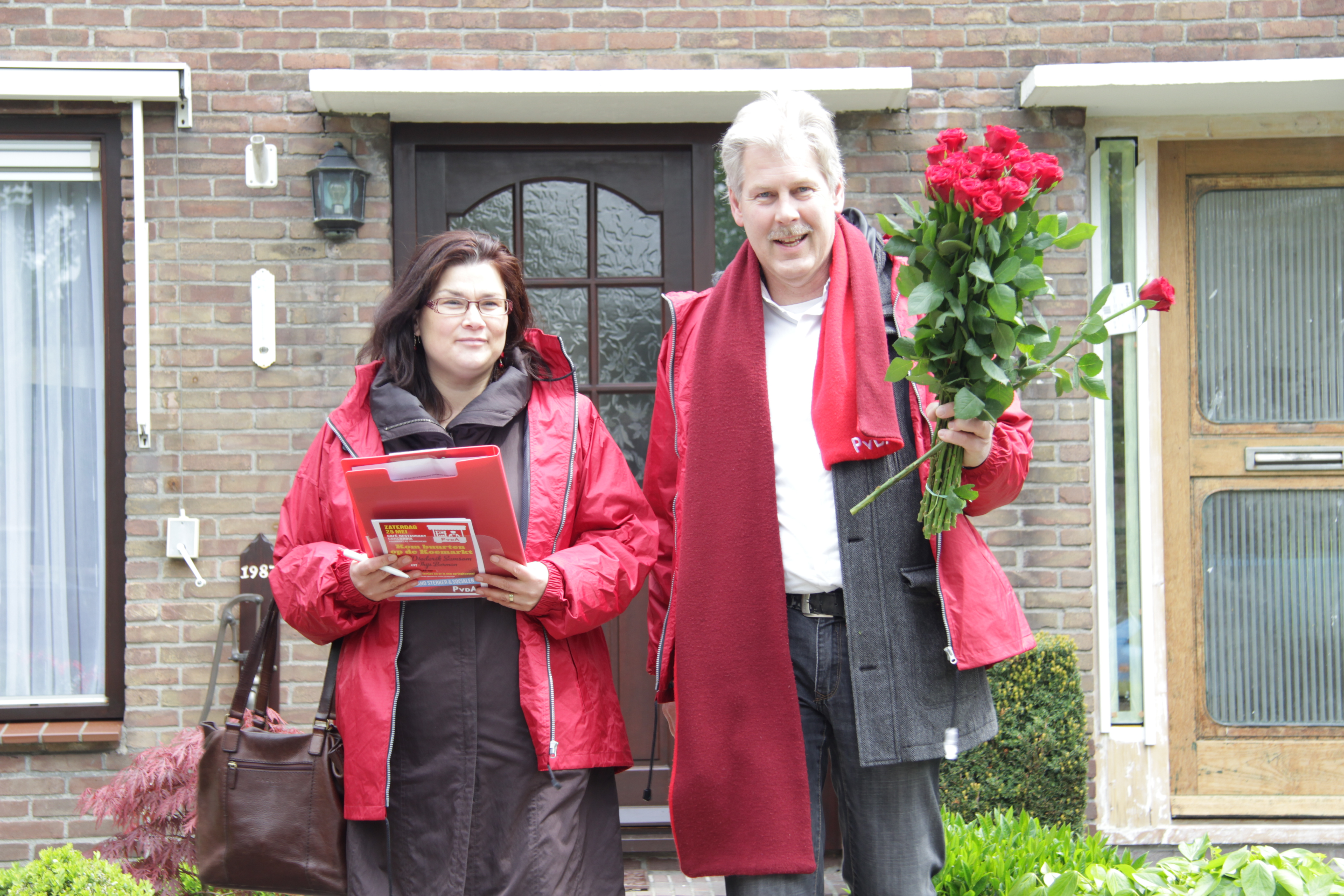 Zaterdag 25 mei was er weer een nieuwe editie van PvdA in de buurt! Tientallen afdelingen deden mee. De landelijke editie vond deze keer plaats in de wijk Overwhere en in het centrum van Purmerend. Met Europa als centraal thema vulden we samen met Diederik Samsom en Emine Bozkurt een mooi programma.